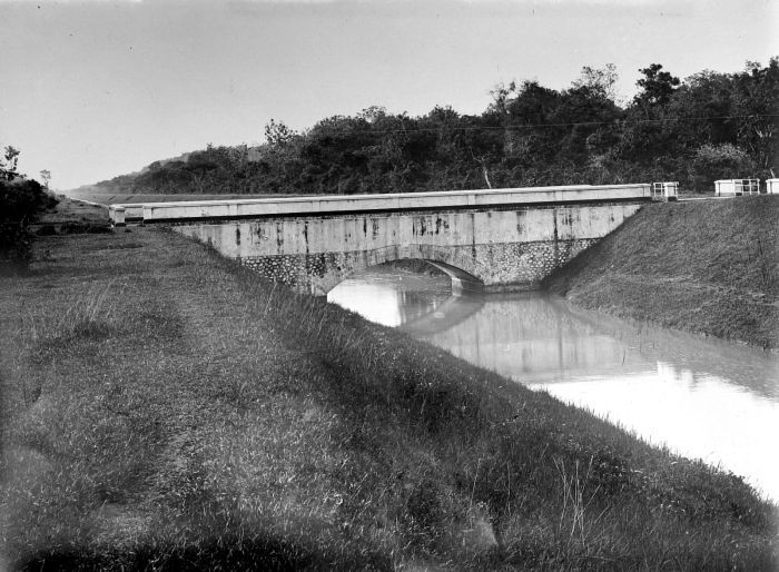 Repronegatief. Brug en aquaduct aan de secundaire leiding S 5 over het Tjomal-hoofdkanaal